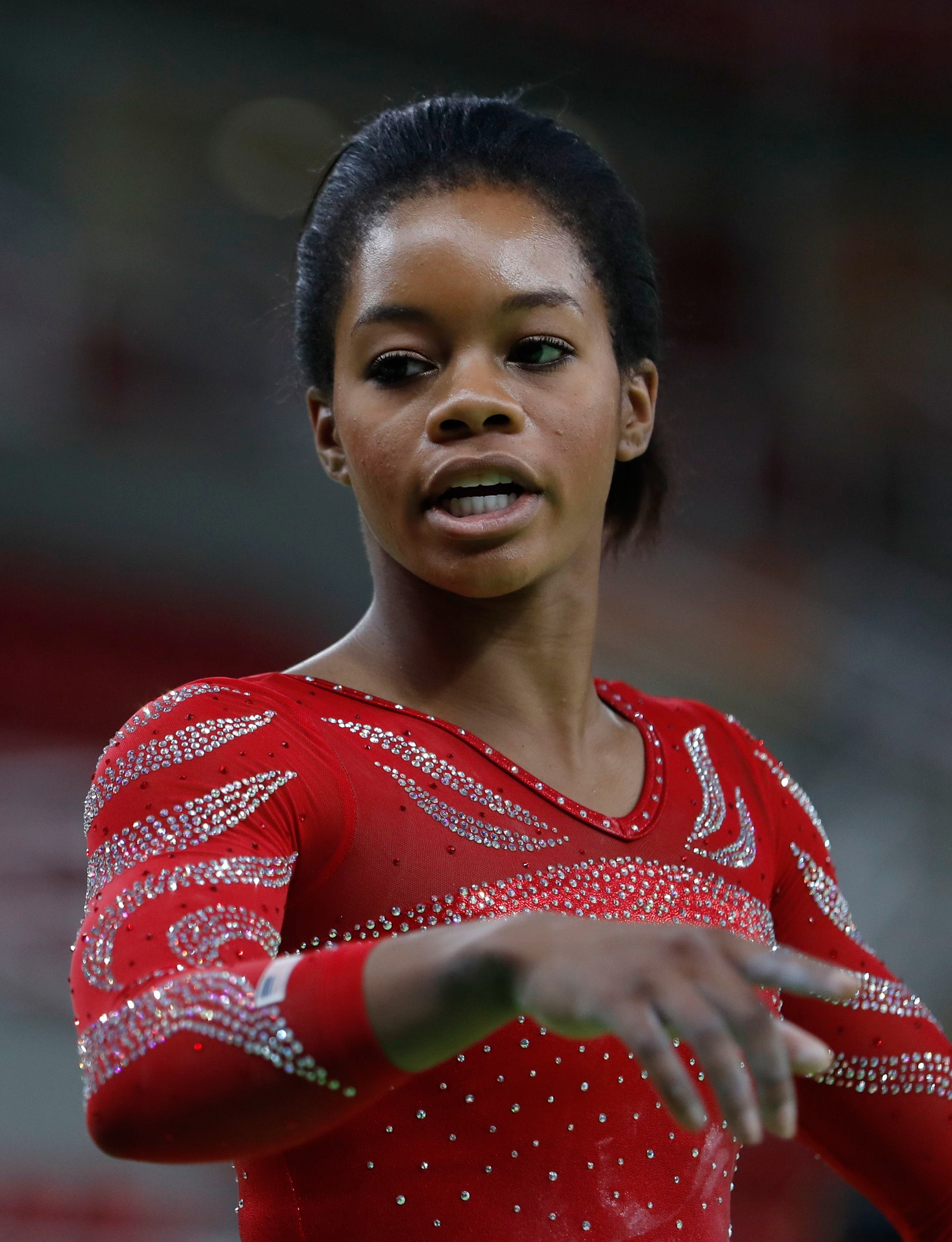 Gabby Douglas no Rio de Janeiro durante treino da equipe de ginástica norte-americana